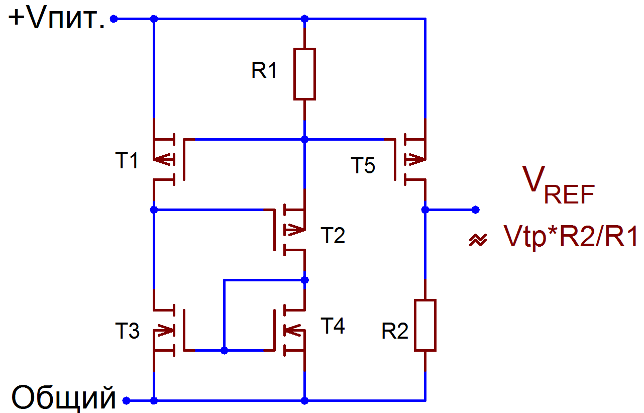 Источник опорного напряжения усилителя считывания памяти DRAM